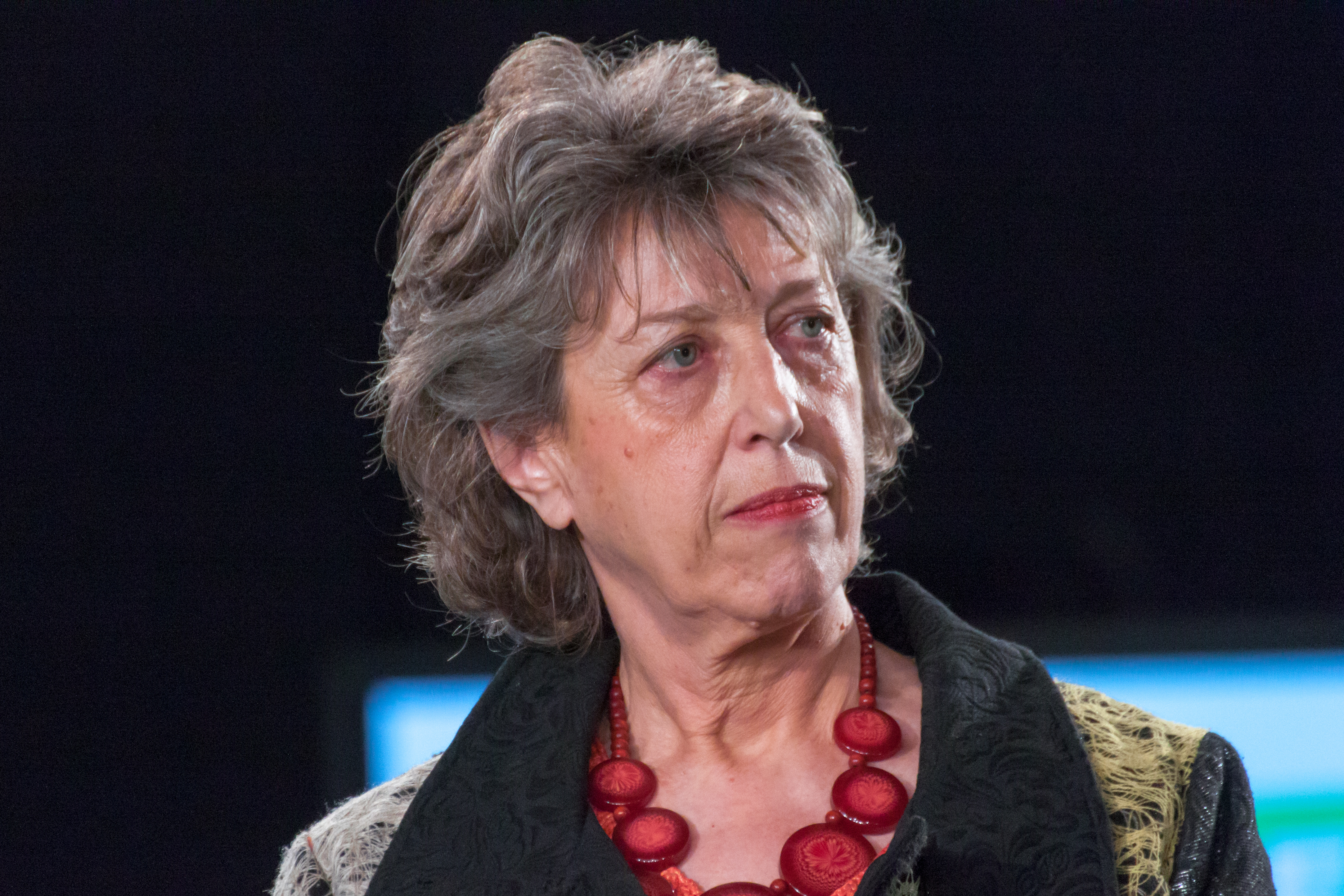 Michèle Bonneton, lors du Meeting d'Eva Joly à Grenoble